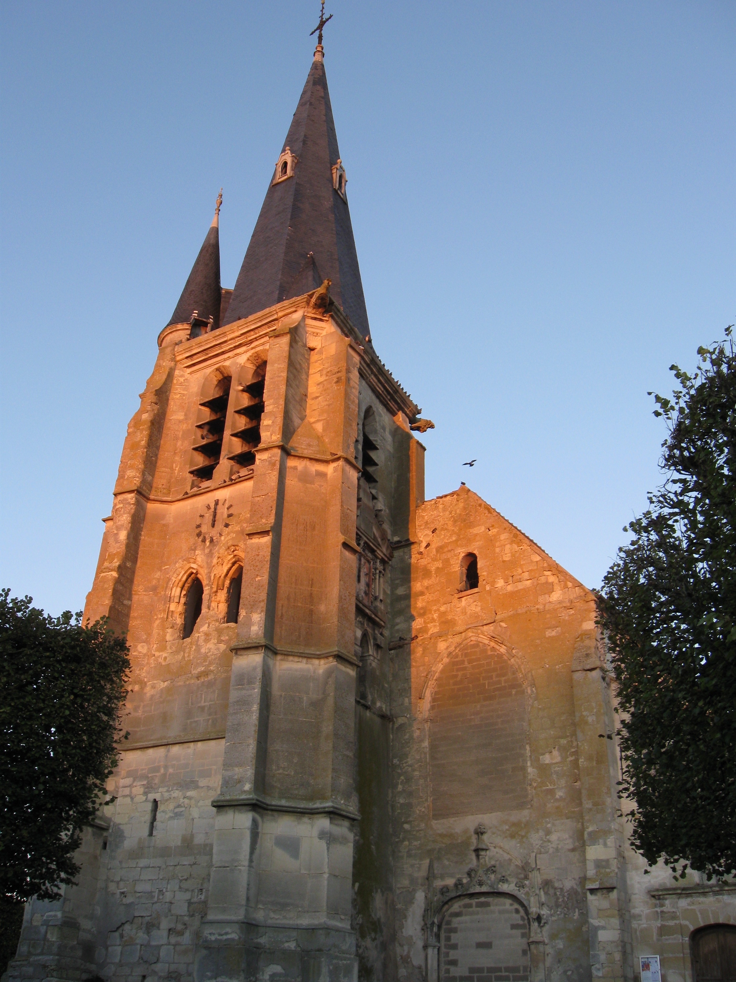 Église Saint-Martin de Mitry-Mory. (département de la Seine-et-Marne, région Île-de-France).